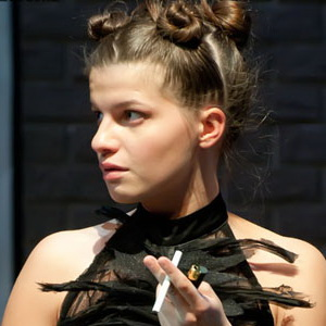 Агния Кузнецова в роли Алисы Эрис на премьере спектакля «Ближе» 20 марта 2010 года